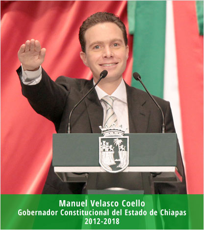 Toma de posesión de Manuel Velasco Coello